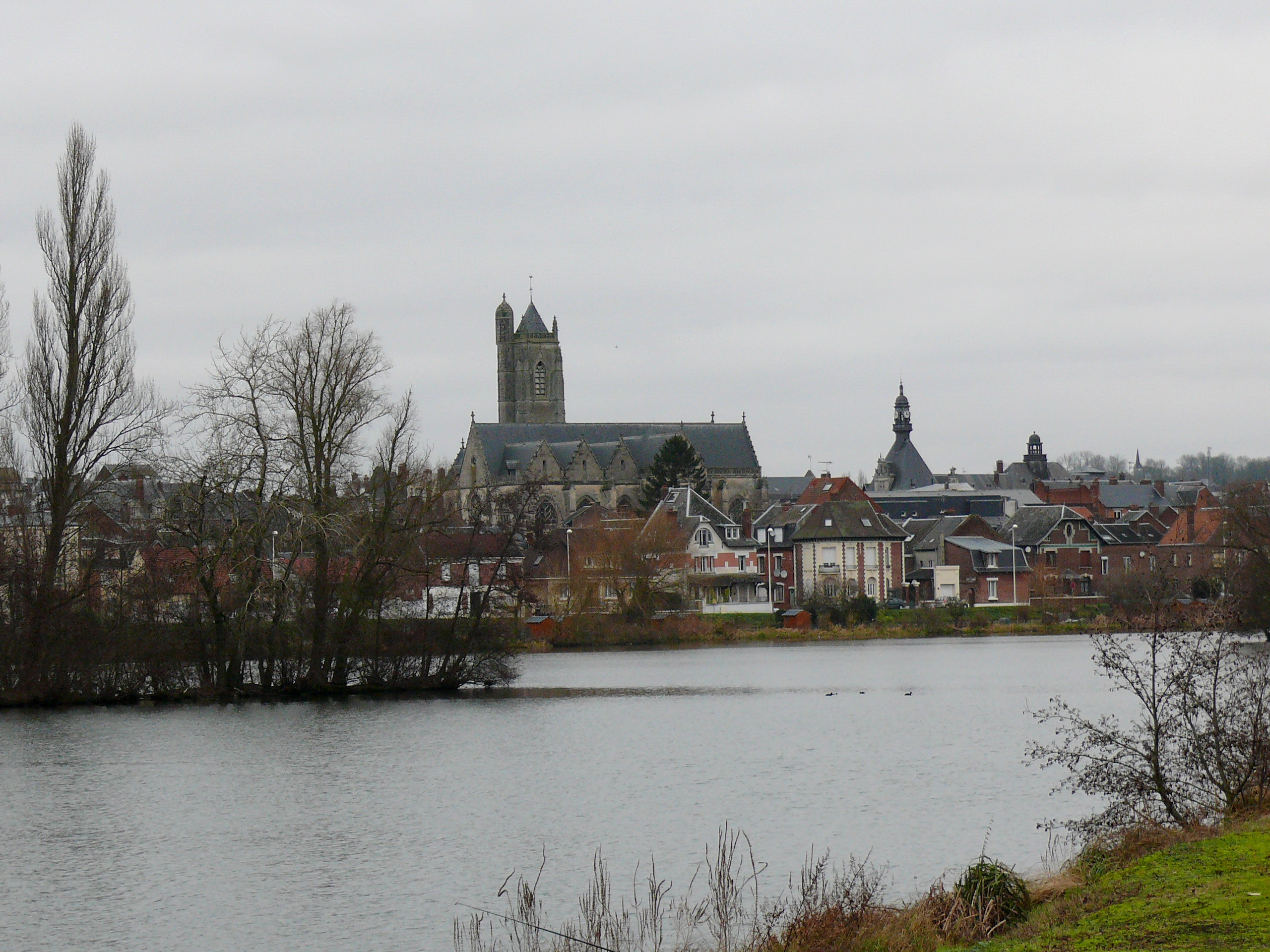 Péronne et les marais de la Somme, vus depuis la plate-forme de l'ancienne Ligne de Saint-Just-en-Chaussée à Douai